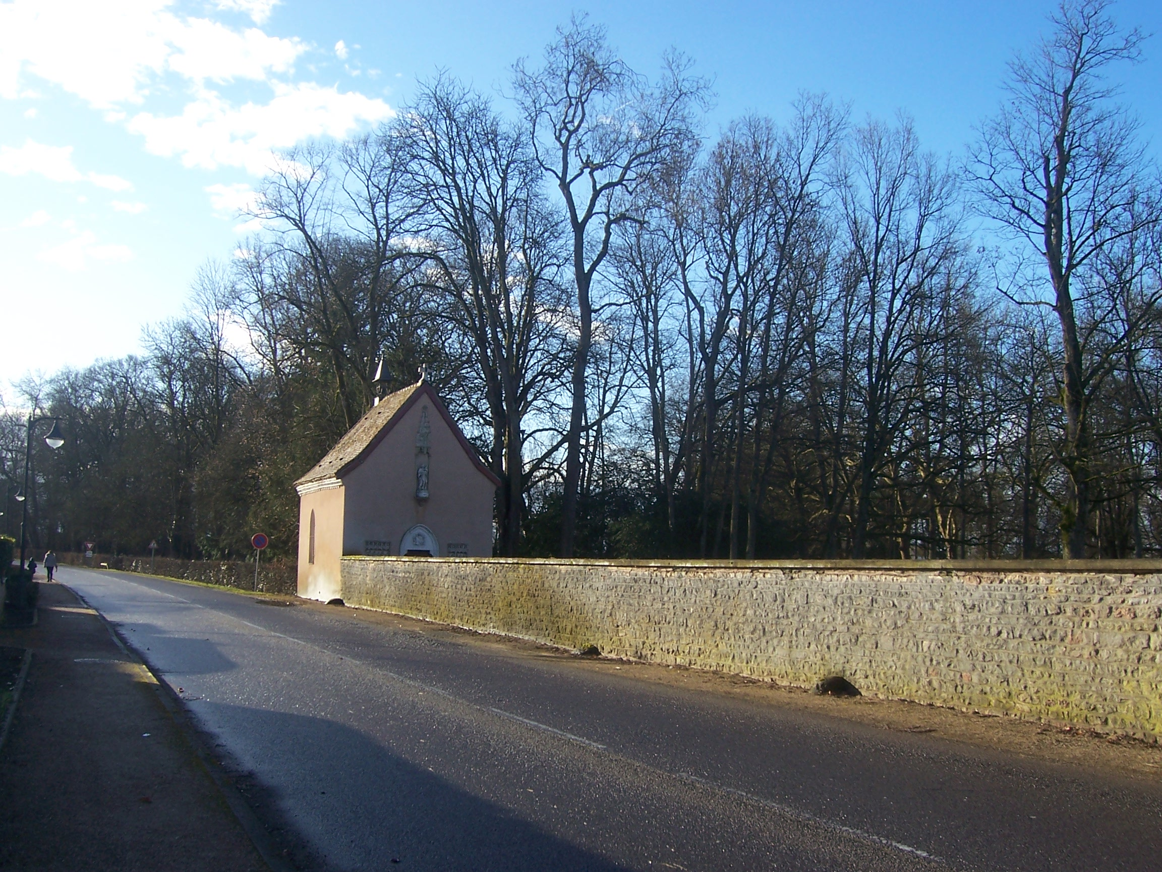 Châtenoy-en-Bresse Chapelle